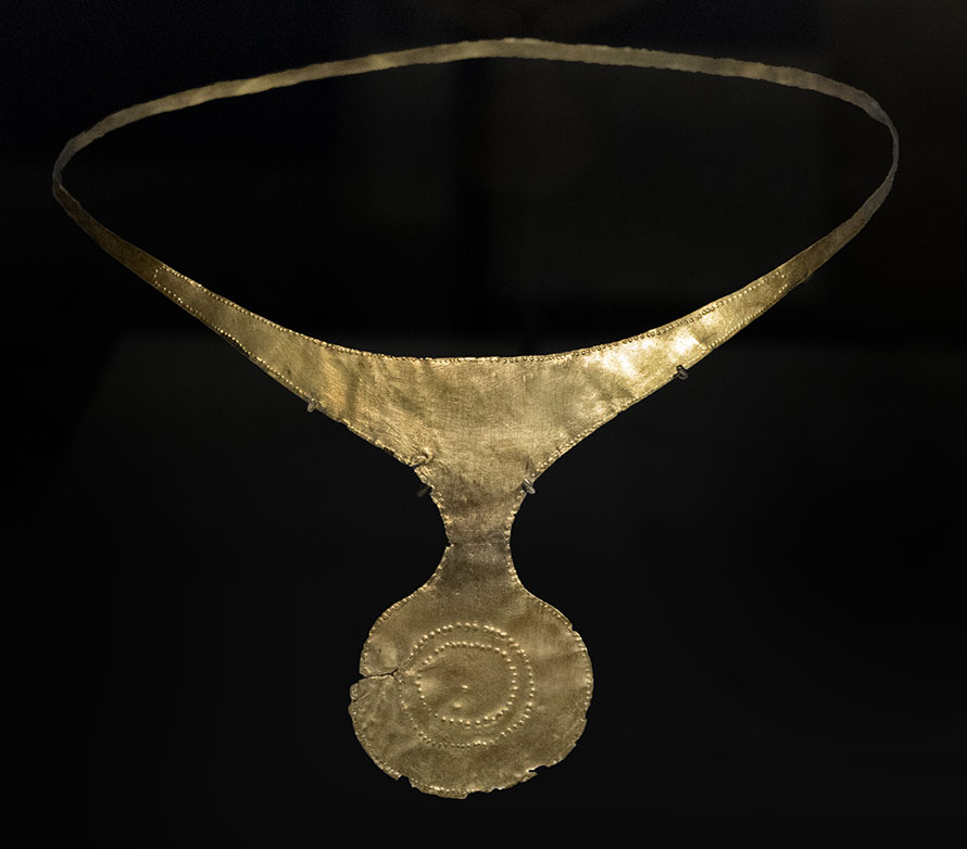 Diadema de oro del Bronce Antiguo-Medio. Se desconoce el contexto arqueológico exacto aunque se sabe que procede de un yacimiento argárico, el Estrecho de la Encarnación (Caracava de la Cruz, Murcia) probablemente de una de sus sepulturas. Es la única pieza de oro conocida en el mundo argárico de estas características. Diámetro: 17,70 cm; grosor: 0,02 cm; peso: 44,40 gr. Está datada en 1500-1300 a. C. Nº Inv. 33114. Museo Arqueológico Nacional de España.